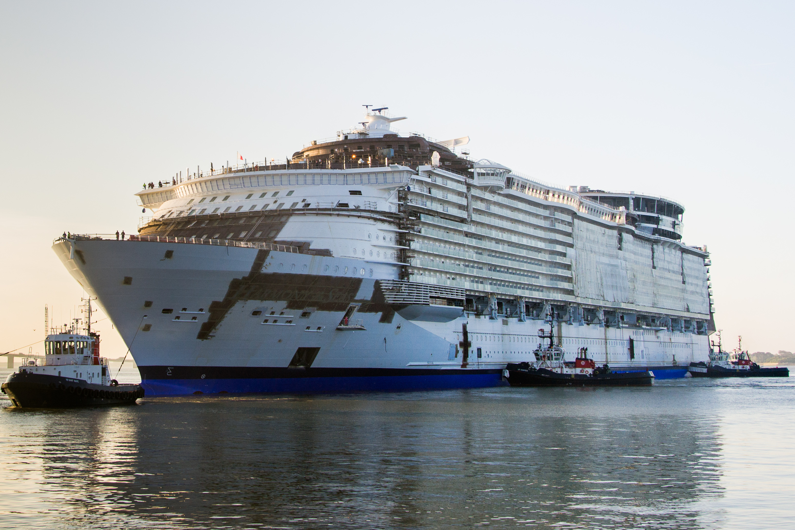 Le Harmony of the Seas lors de son changement de bassin pour son armement au Chantier naval de Saint-Nazaire en Juin 2015.